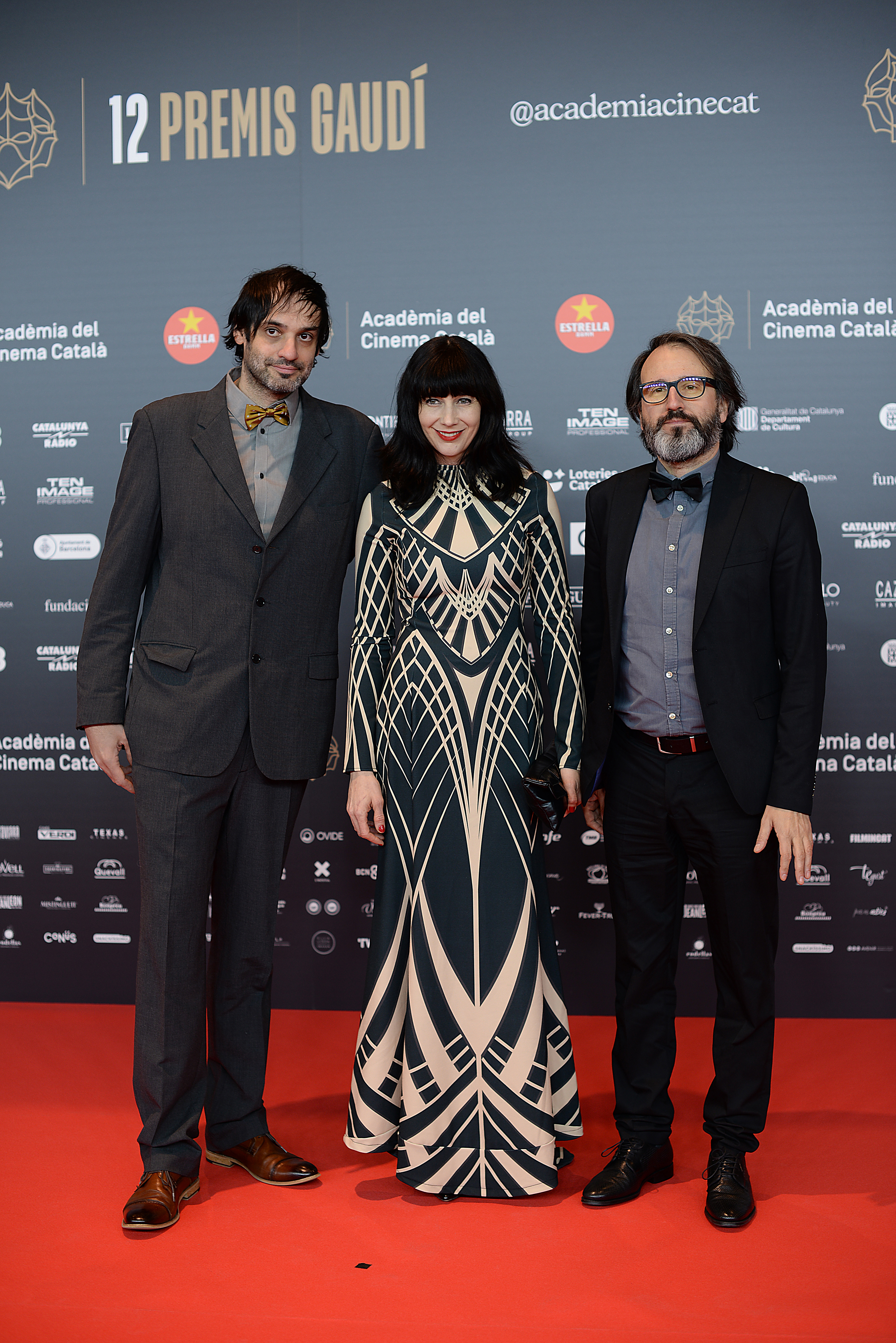 Àlex Lora, Isa Feliu i Adán Aliaga (El cuarto reino), XII Premis Gaudí (2020)